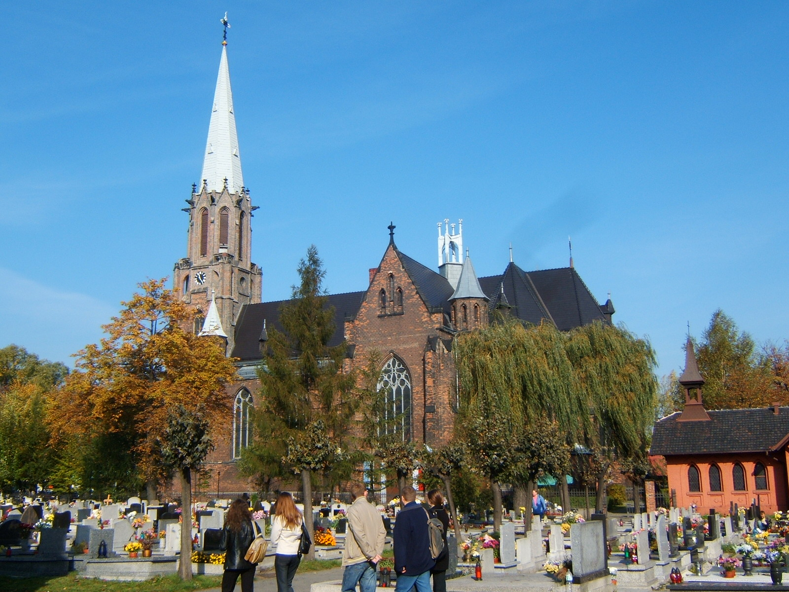 Ruda Śląska Godula, ul. Goduli 22 - ościół parafialny pw. św. Jana Chrzciciela (zabytek nr A/10/99 z 30.04.1999)